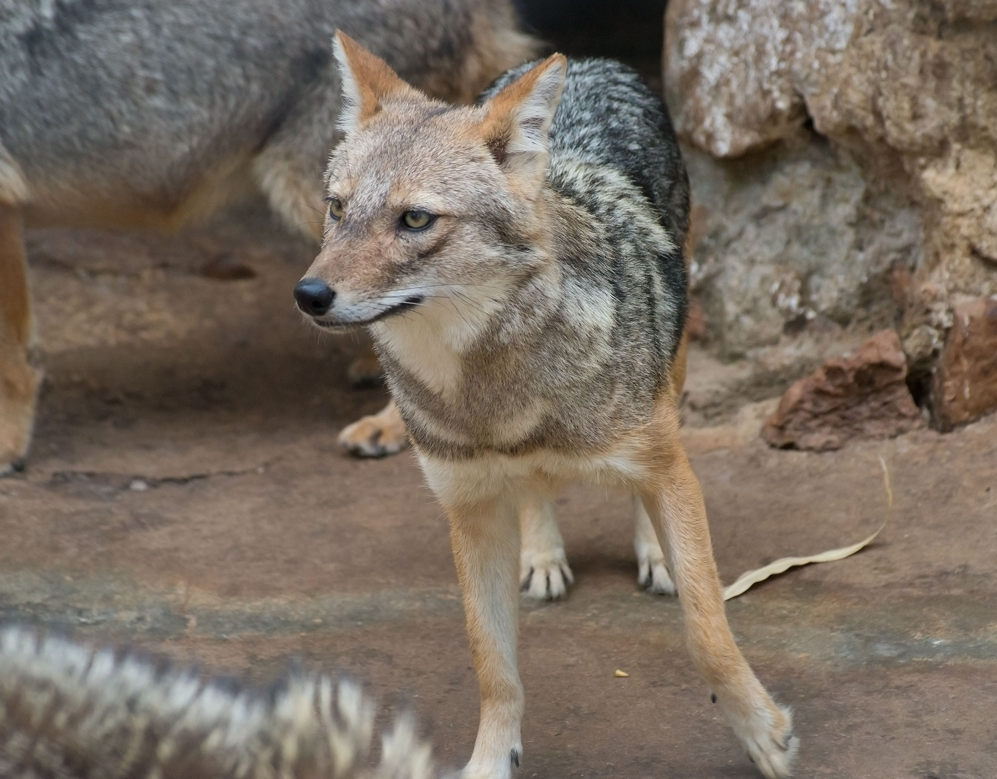 Индийский шакал